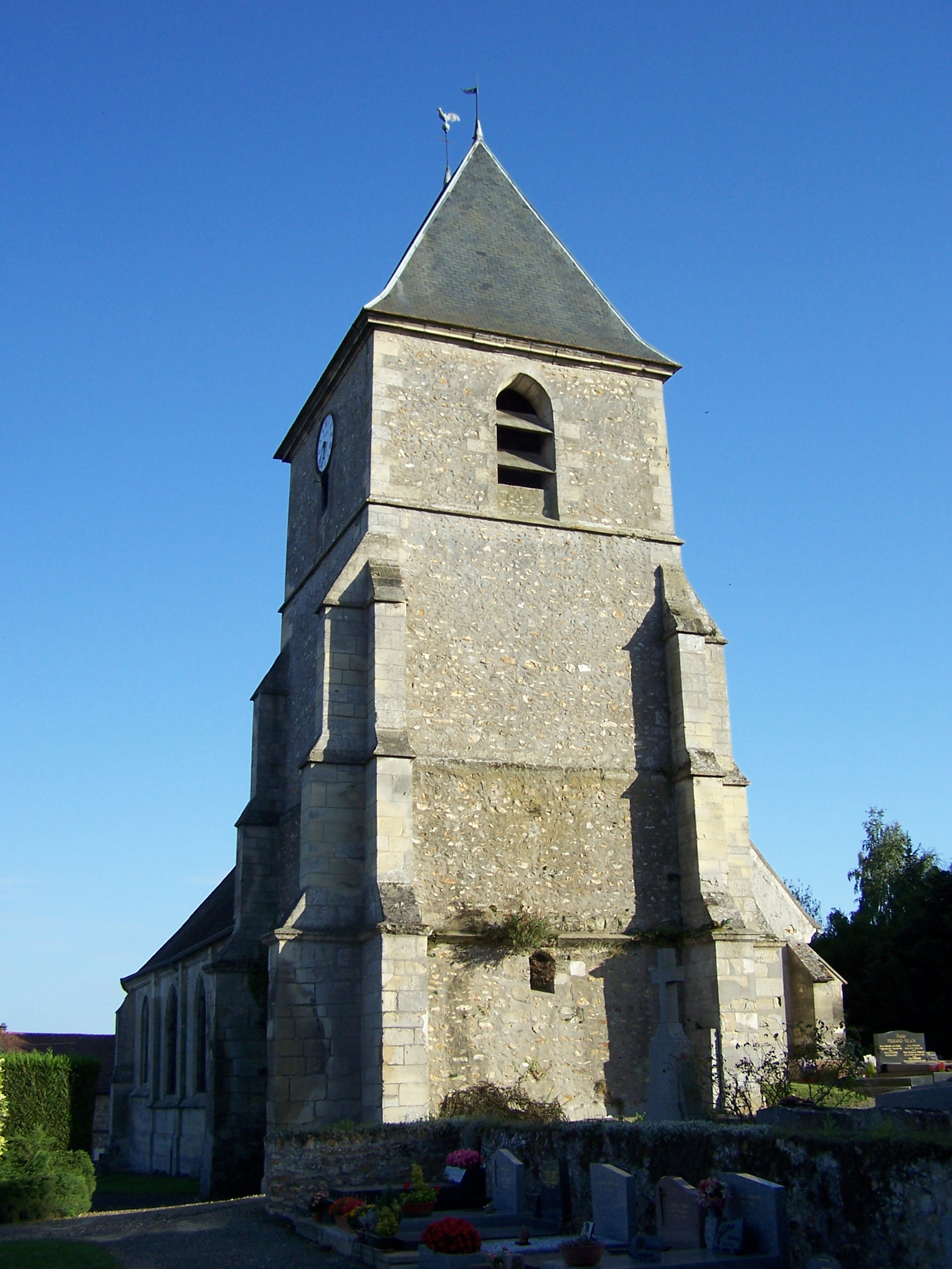 Église de Marcq (Yvelines, France)